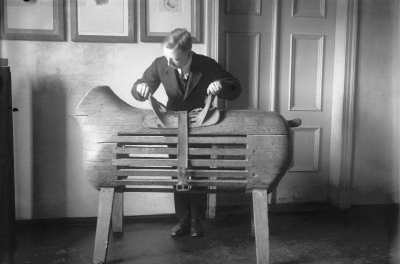 Das älteste Turnpferd ! Das älteste Turnpferd, an welchem schon der bekannte Turnvater Jahn seine Turnübungen lehrte.